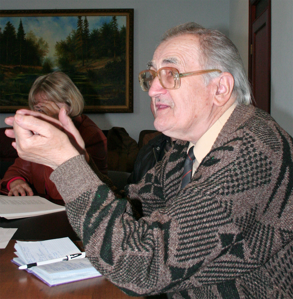 Wolodymyr Krasylenko